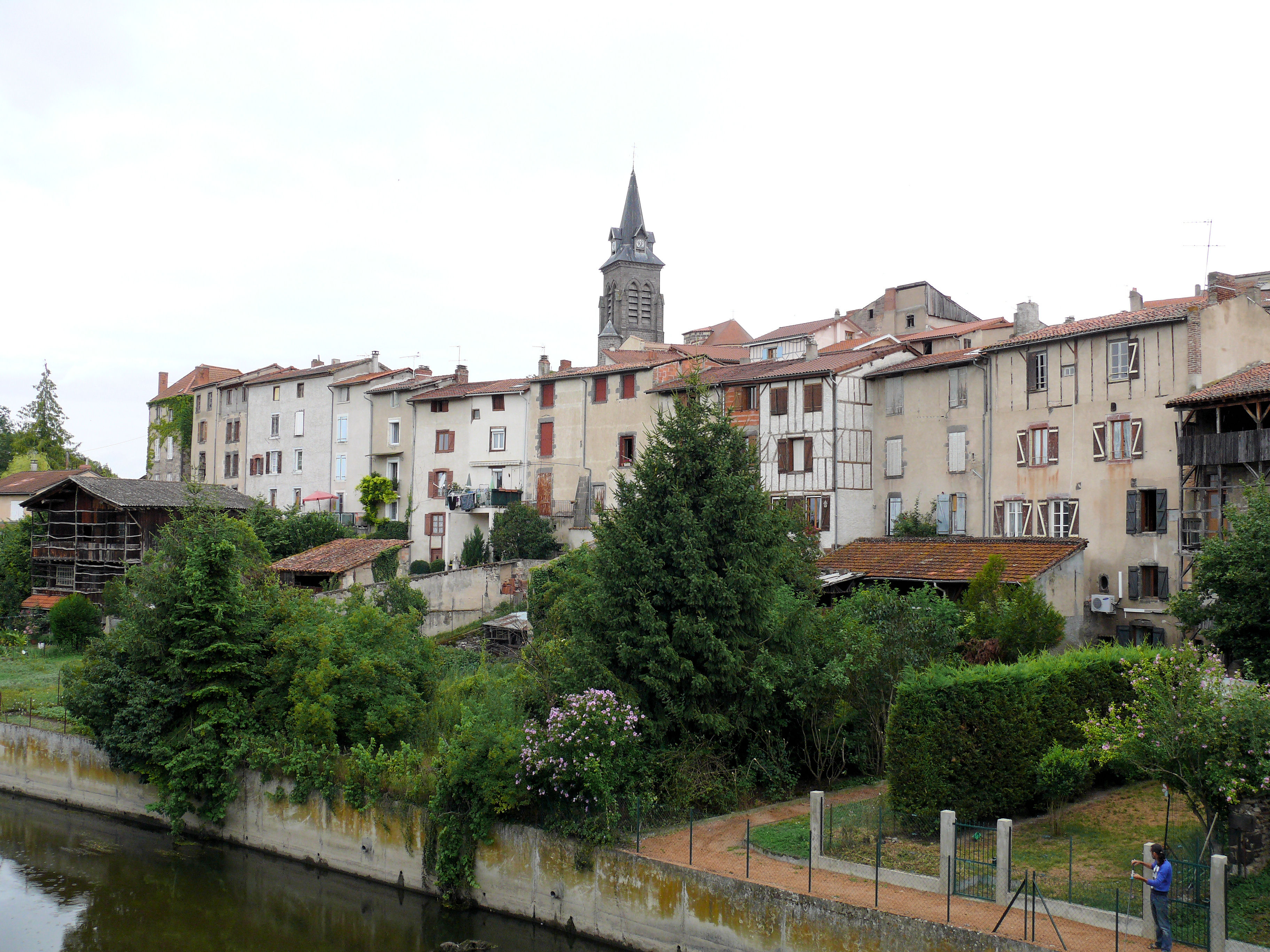 Maringues - La ville le long de la Morge vue du pont